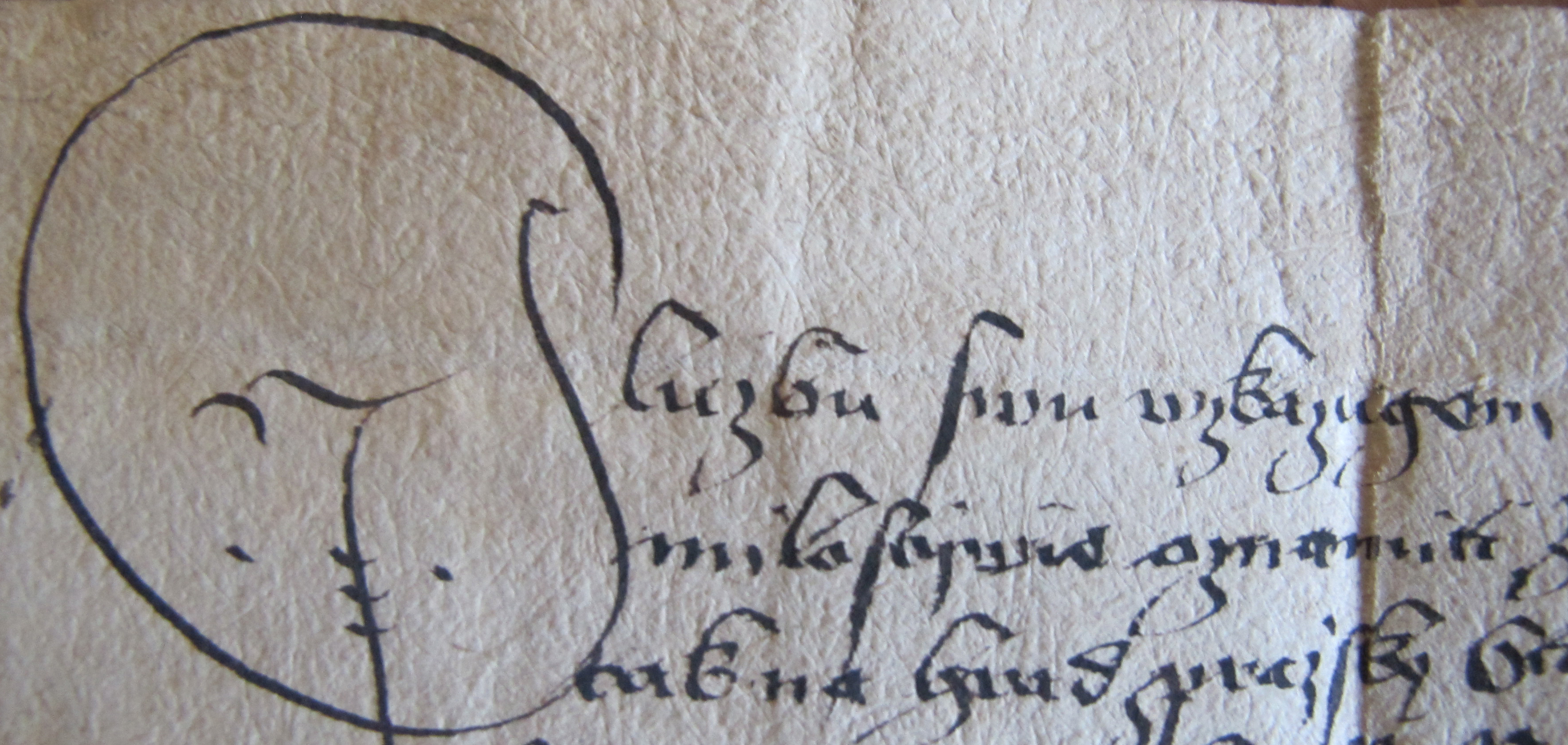 Salutace: Sluzbu swu wzkazugem v listině z 10. října 1558. Purkmistři a rady Starého a Nového Měst Pražských žádají purkmistra a konšele města Mostu, aby u příležitosti příjezdu krále Ferdinanda I. Habsburského do Prahy vyslali zástupce města ve zbroji a prosí je o odpověď, kolik měšťanů přijede.